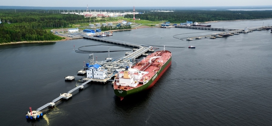 Копия Приморск порт